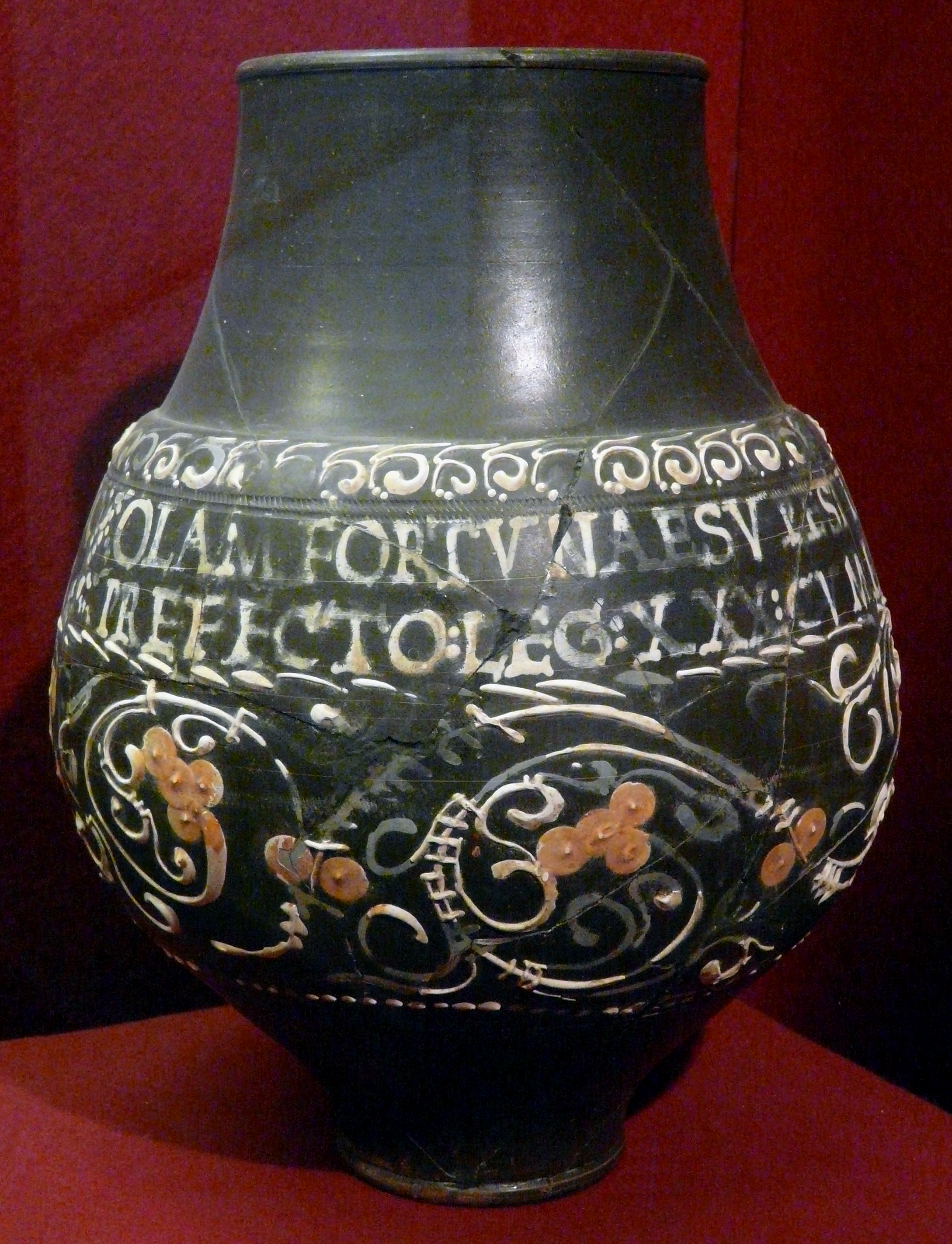 Engobierte Keramik (Ende 3. Jh.) aus Gelduba (Grab 5555, Brandgrab in Kreisgraben), Museumszentrum Burg Linn;Inschrift: OLAM FORTVNAE SVPESTINIVS FILICA CLEMENTINIO ADVENTO PREFECTO LEG XXX CVM FAMILIA SVA VTATVR FELICITER. Literatur: Susanna Künzl: Die Trierer Spruchbecherkeramik. Dekorierte Schwarzfirniskeramik des 3. und 4. Jahrhunderts. Trier 1997, ISBN 3-923319-35-5 (Beihefte Trierer Zeitschrift 21), S. 192, Kat.-Nr. KRE 119.